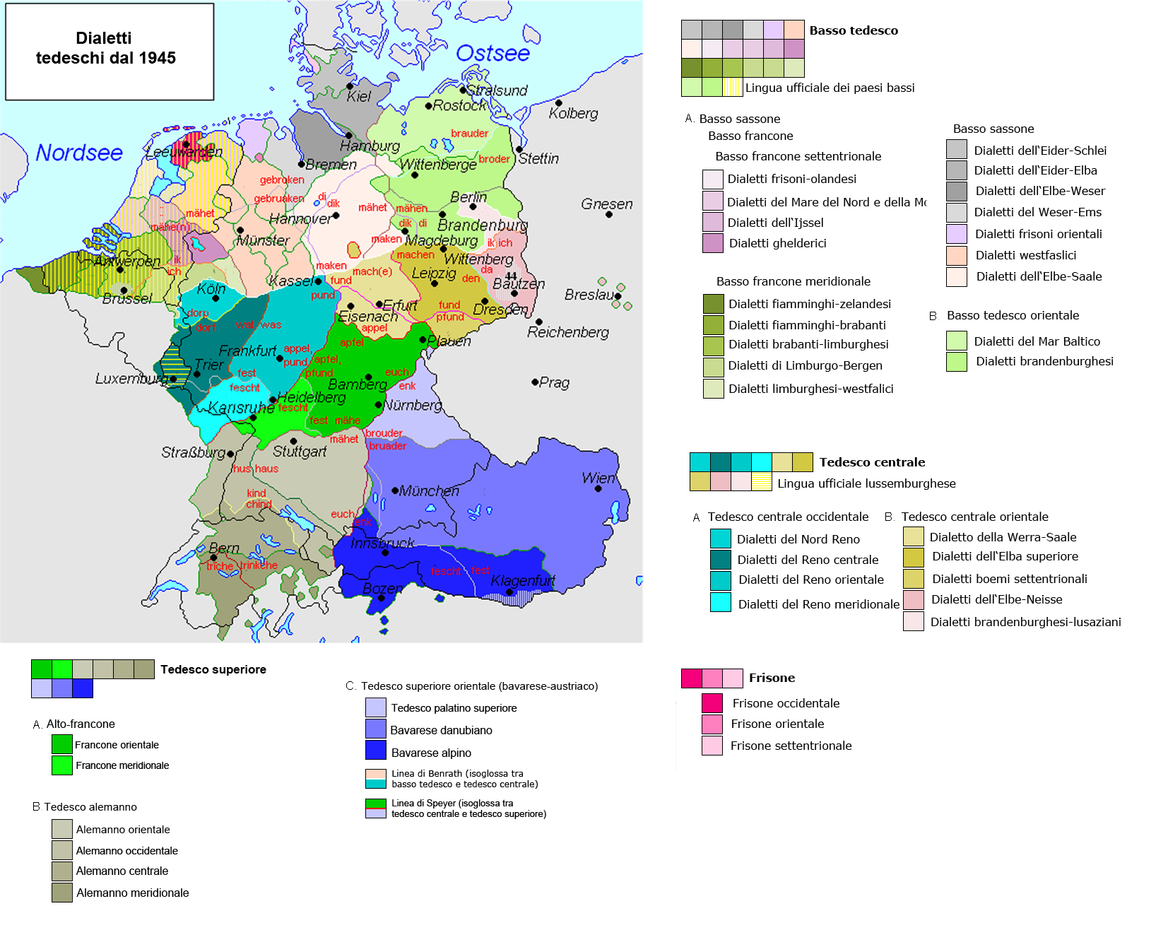 I dialetti tedeschi e frisoni dopo il 1945